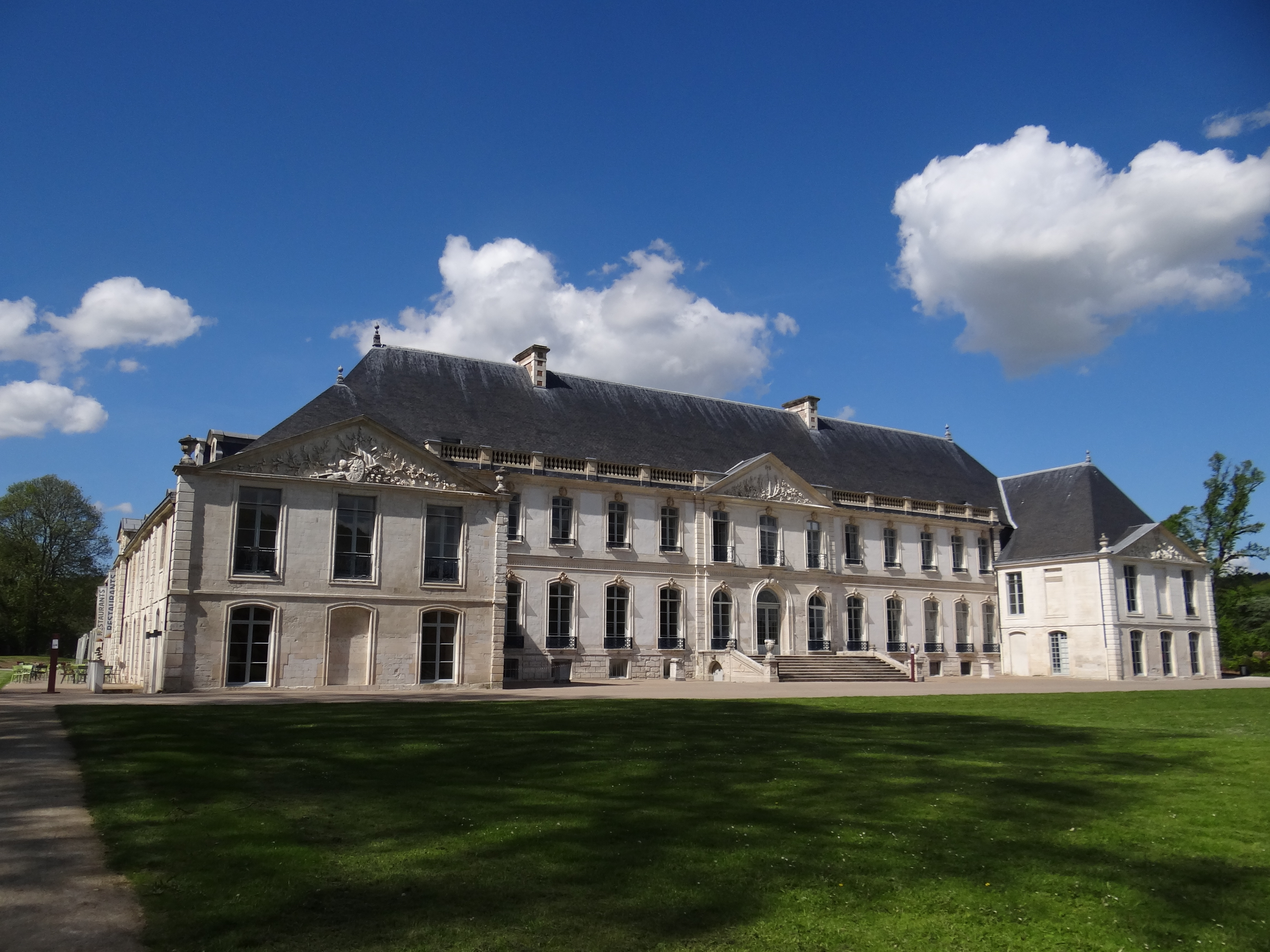 Peron Sud